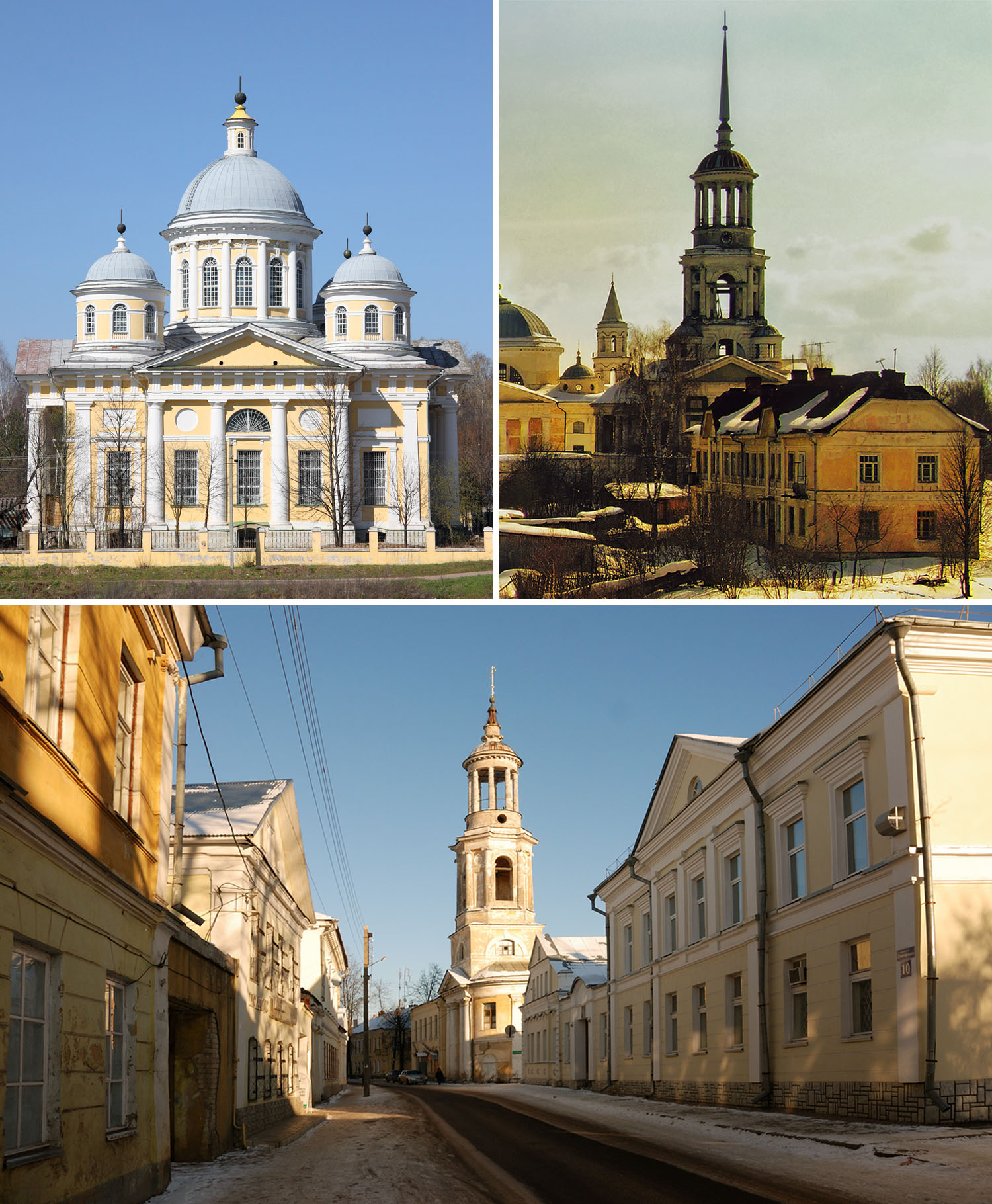 Коллаж для статьи о Торжке из фотографий